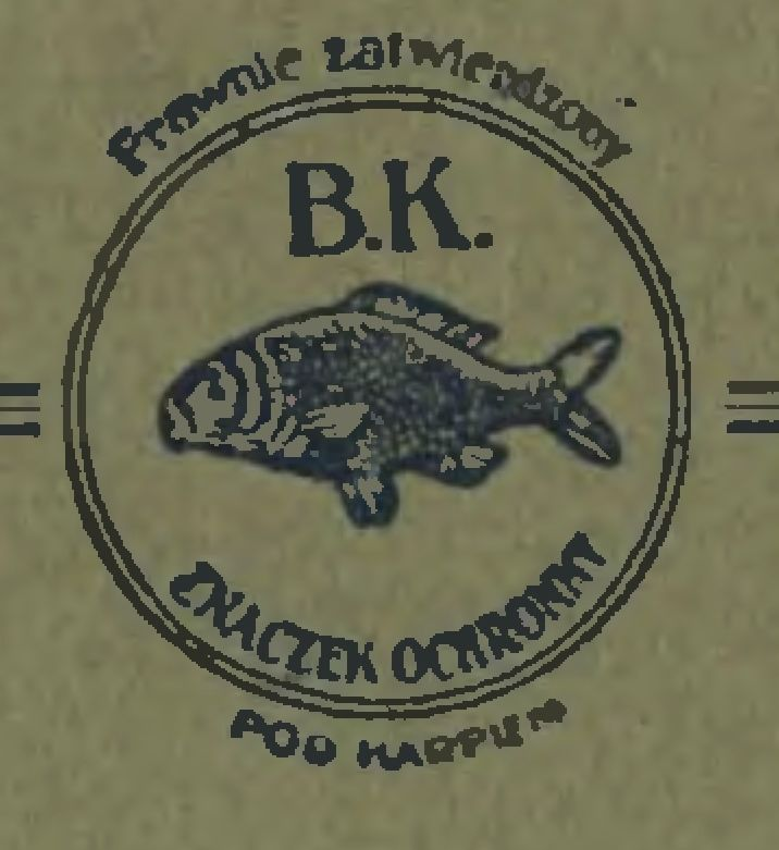 Logo Bolesław Michał Kasprowicz ogłoszenie reklamowe w książce "Ilustrowany Przewodnik po Gnieźnie i okolicy" wydanej nakładem Księgarni W. Lebiedzinskiej, Gniezno 1929